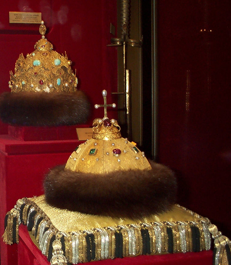 symbole de l'autocratie en Russie